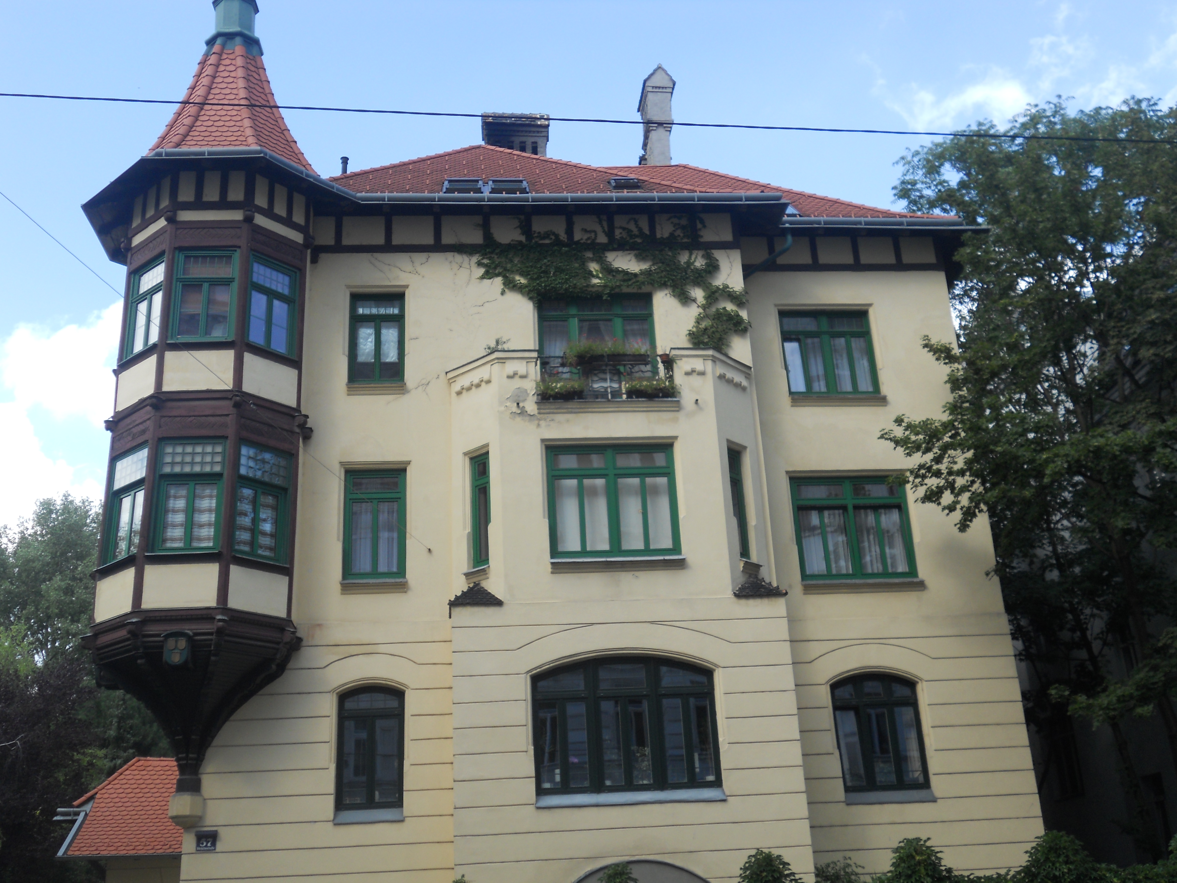 Haus Böcklinstraße 57 in Wien